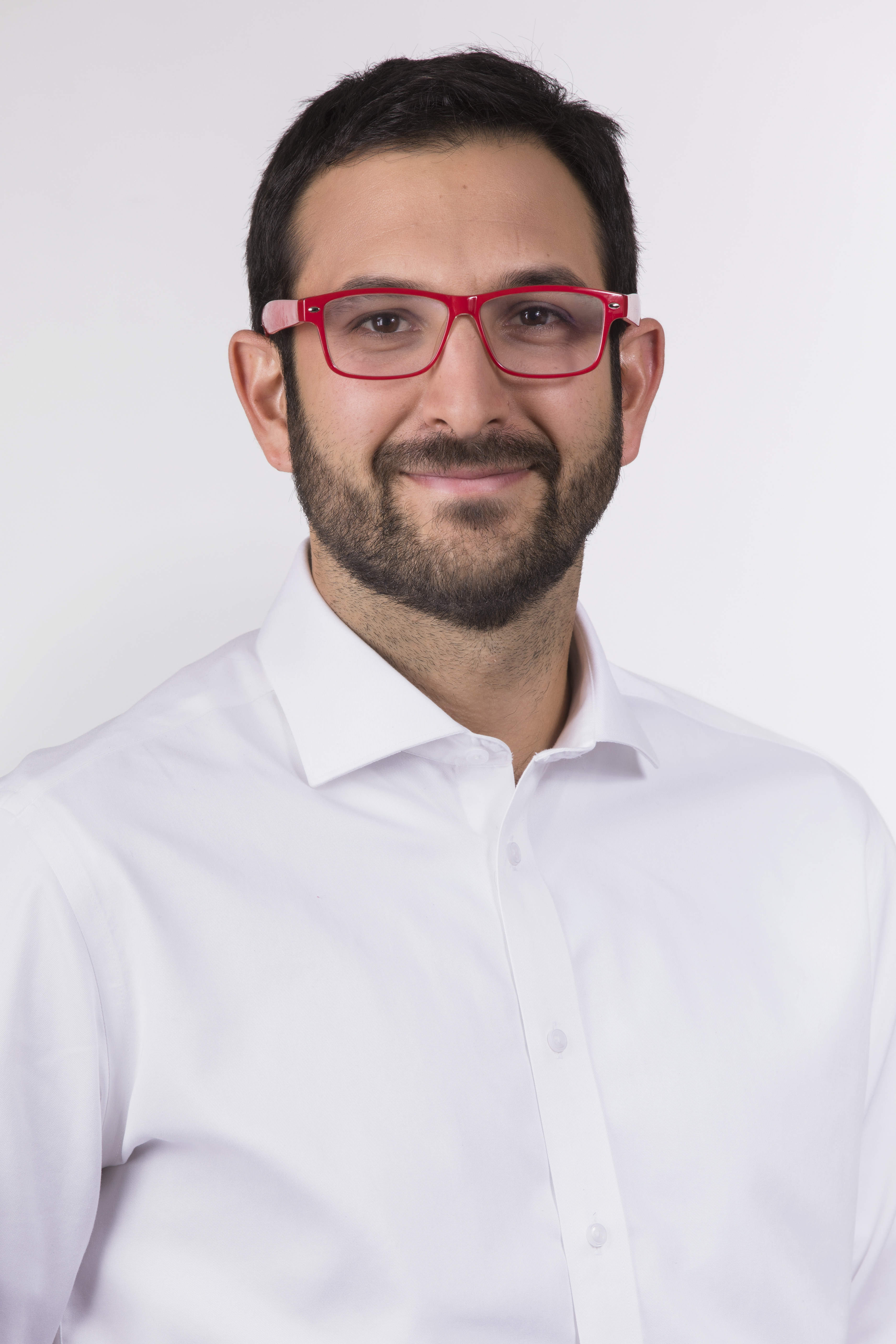 Fotografía oficial de diputados periodo 2018-2022.Fotos: Christel Andler, René Lescornez, Johanna Zárate